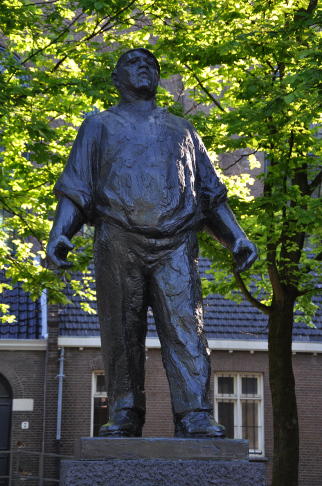 De Dokwerker Locatie: Jonas Daniël Meijerplein, Amsterdam Kunstenaar: Mari Andriessen Jaartal: 1952 Materiaal: gegoten brons Foto © Gus Maussen